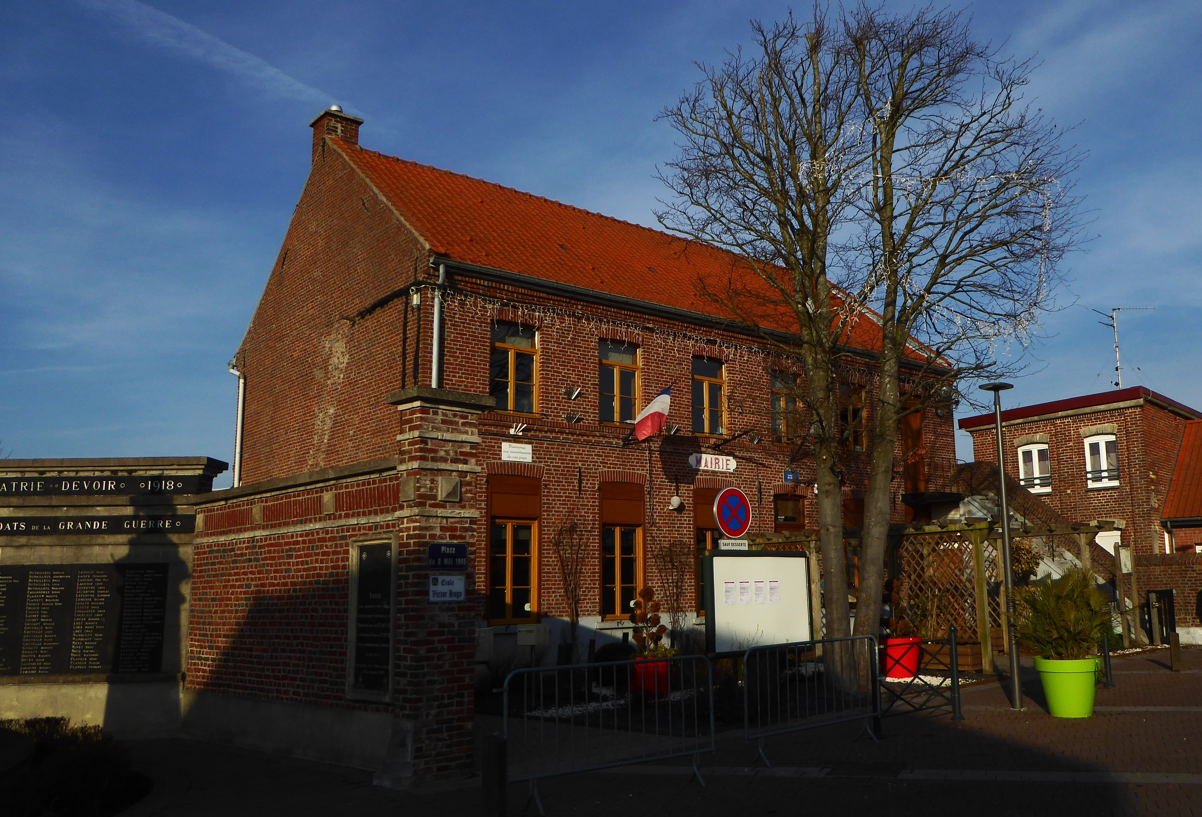 La mairie Houplin-Ancoisne Nord en Hauts-de-France. France